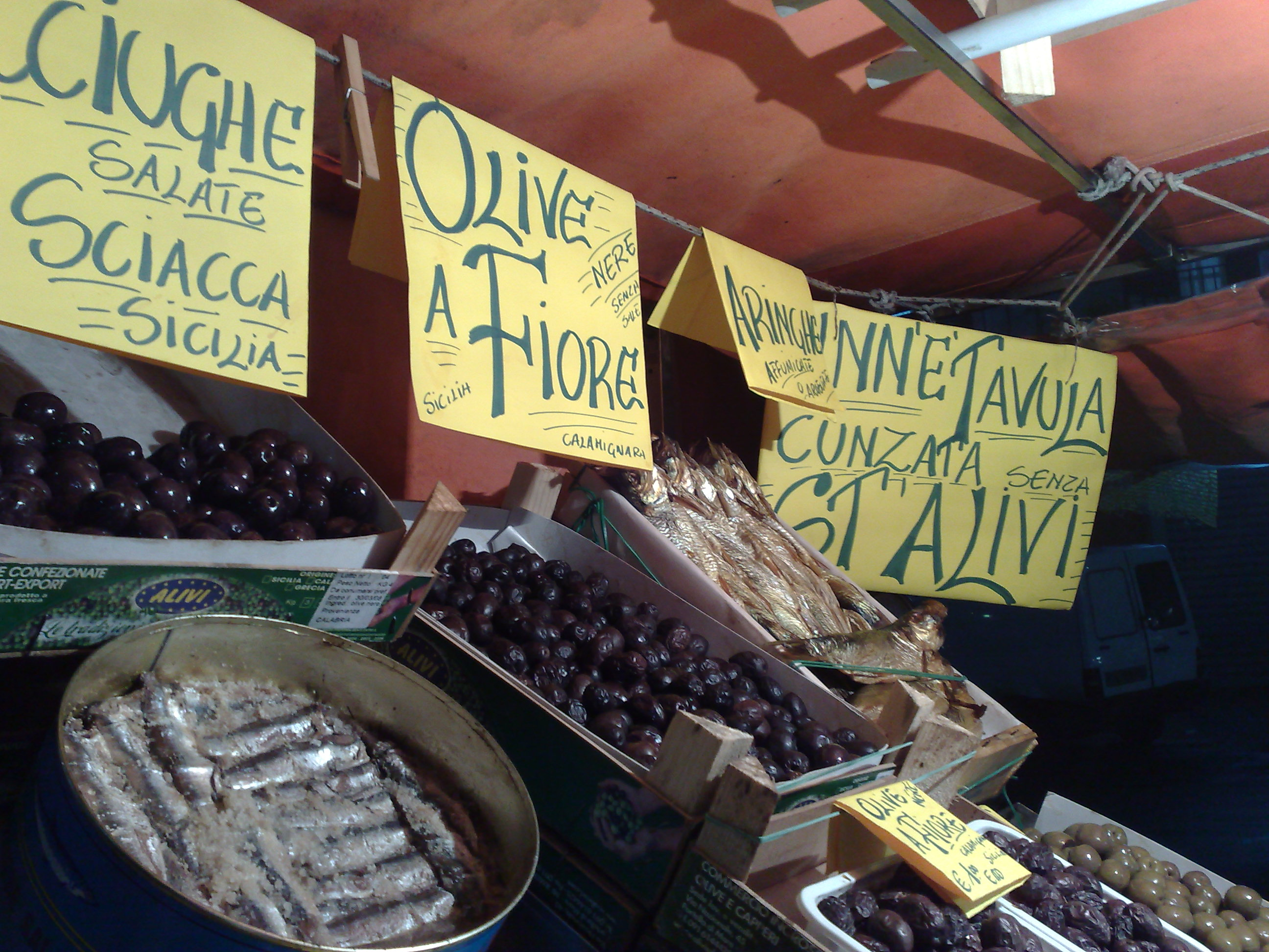 venditore di olive a Palermo